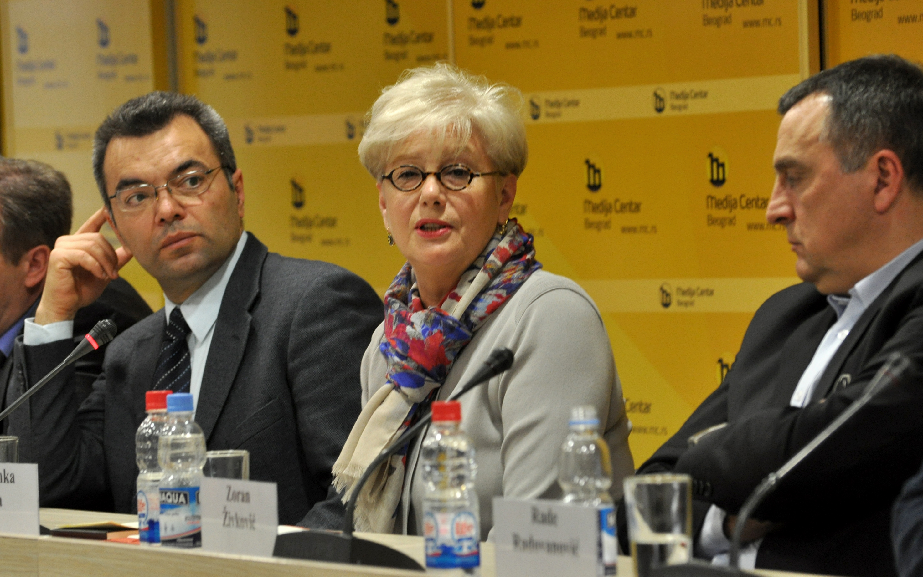 Бранка Прпа српска историчарка